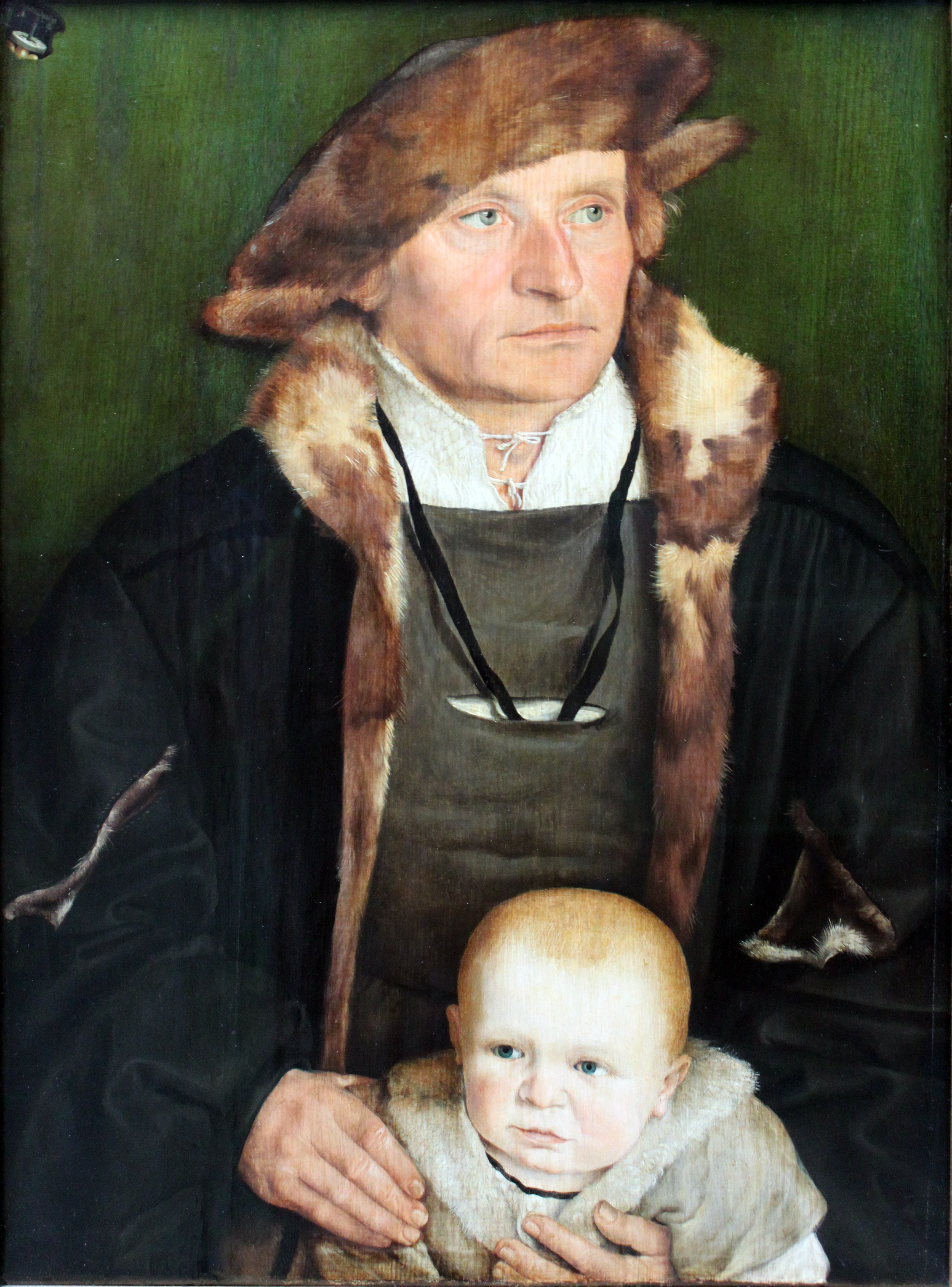 Das Gegenstück mit der Gemahlin Urmillers und einer Tochter befindet sich in Philadelphia. Der erwartungsfrohe Ausdruck der Tochter steht im Gegensatz zur abgewandten Haltung des Jungen und dem sorgenvollen Blick des Vaters in Frankfurt. Mit der Einbeziehung der Kinder entstand ein psychologisches Familienbildnis im Gegensatz zum typischen Allianzbildnis des Spätmittelalters.